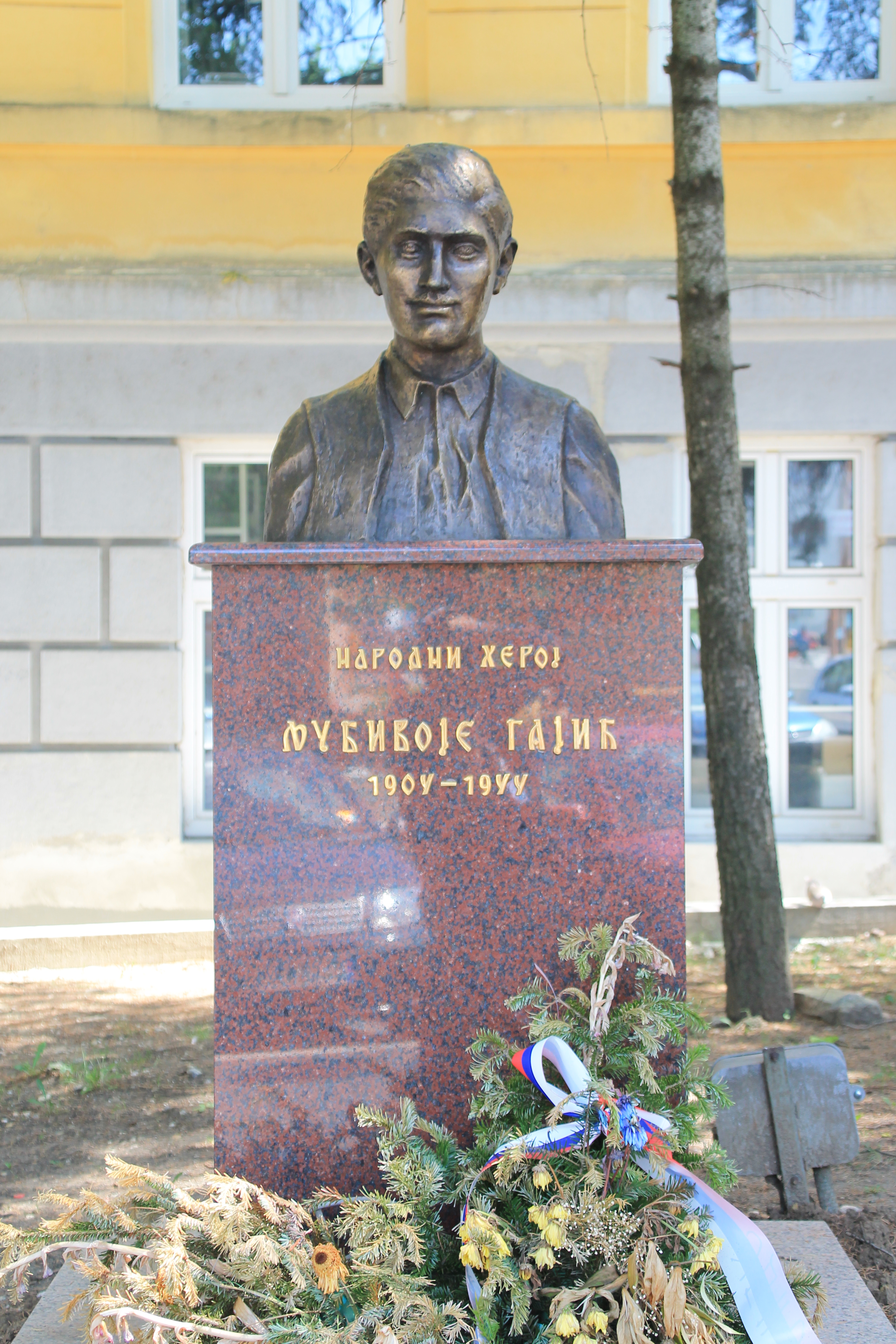 SopSopot, Belgradeot, Belgrade